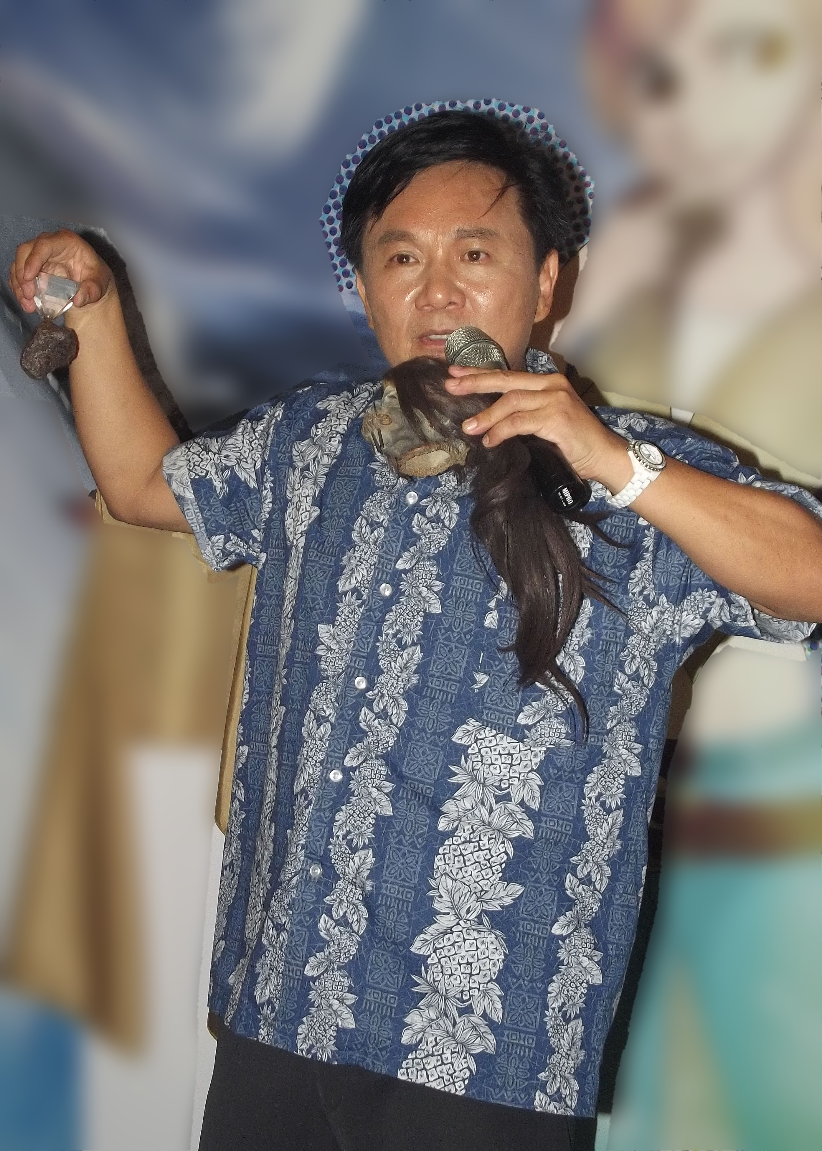 Peter Hao-ping Hsui. (2014 Taoyuan International ACGT Fair.)